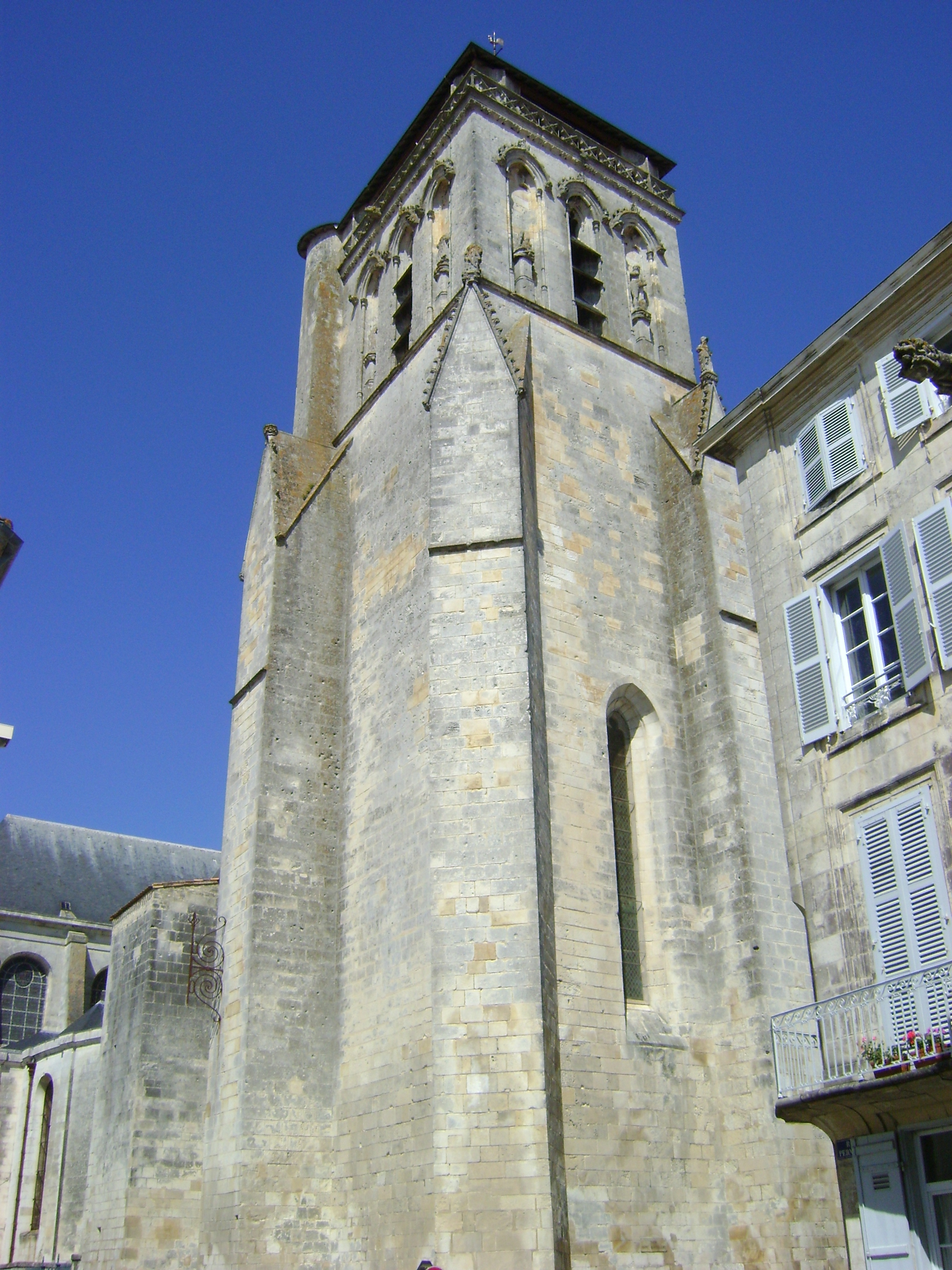 Clocher Saint-Barthélémy de la cathédrale Saint-Louis de la Rochelle. Dernière partie restante de l'église Saint-Barthélémy à la place de laquelle fut bâtie la cathédrale Saint-Louis. .